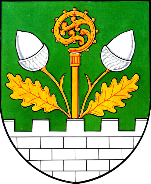 Znak obce Vacenovice